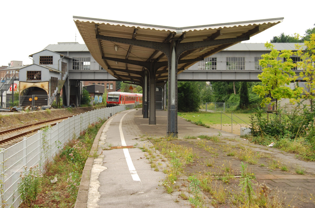 Alter Solingen Hauptbahnhof, Gleise und Bahnsteige